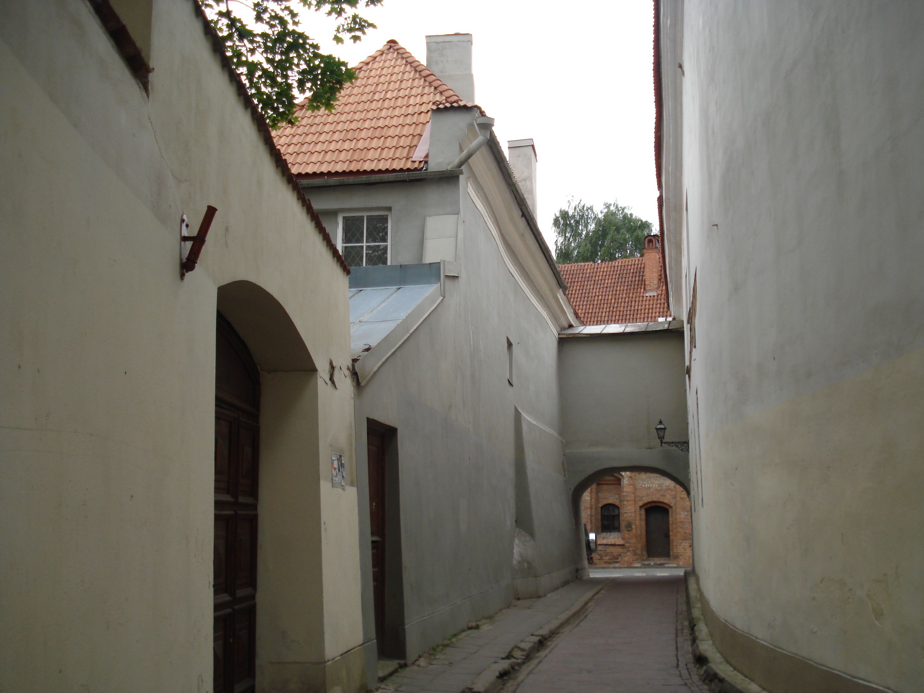 Skapo gatvė in Vilnius